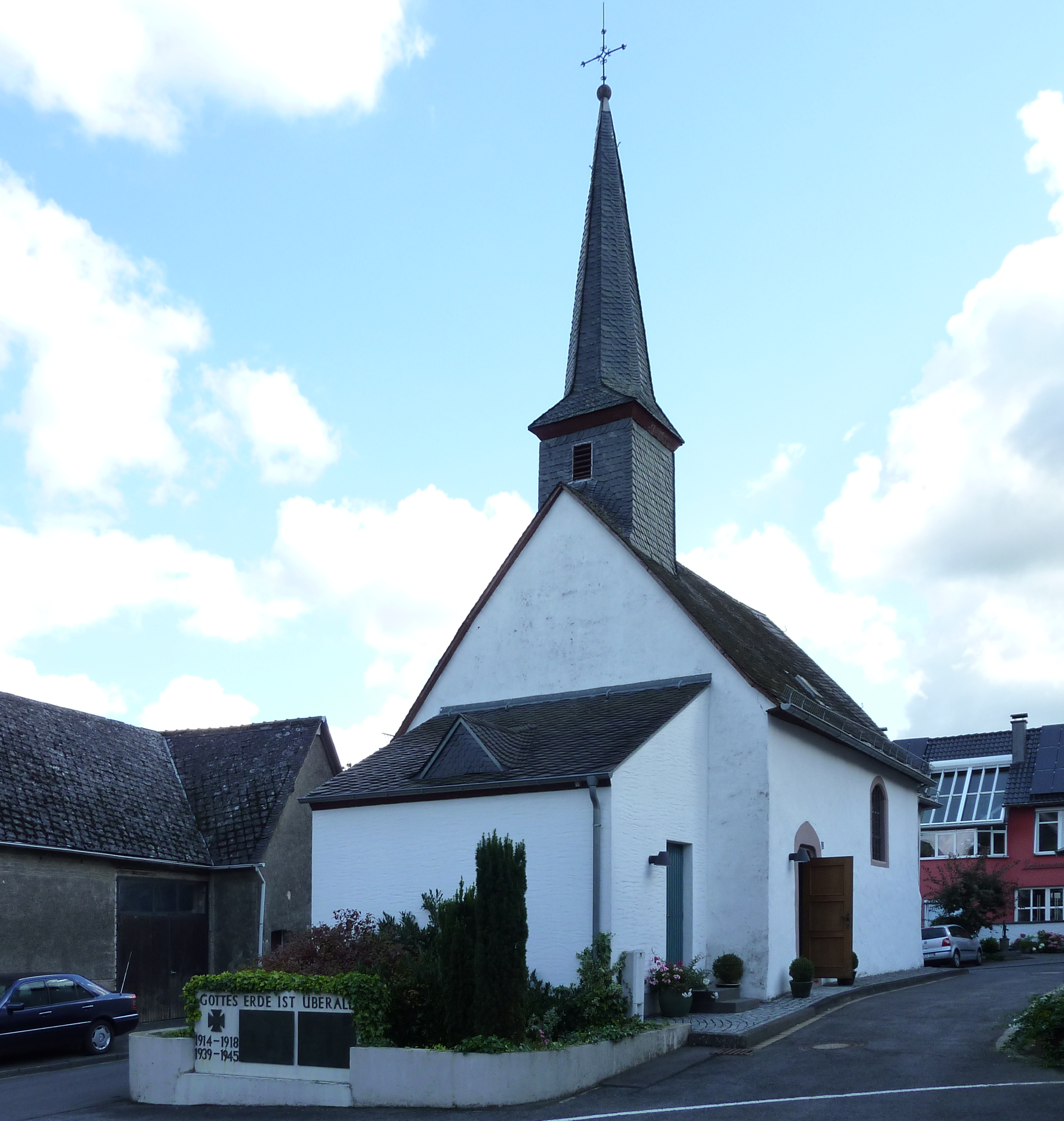 Hüngersdorf, Kapellenplatz 1, kath. Kapelle St. Anna, von SW